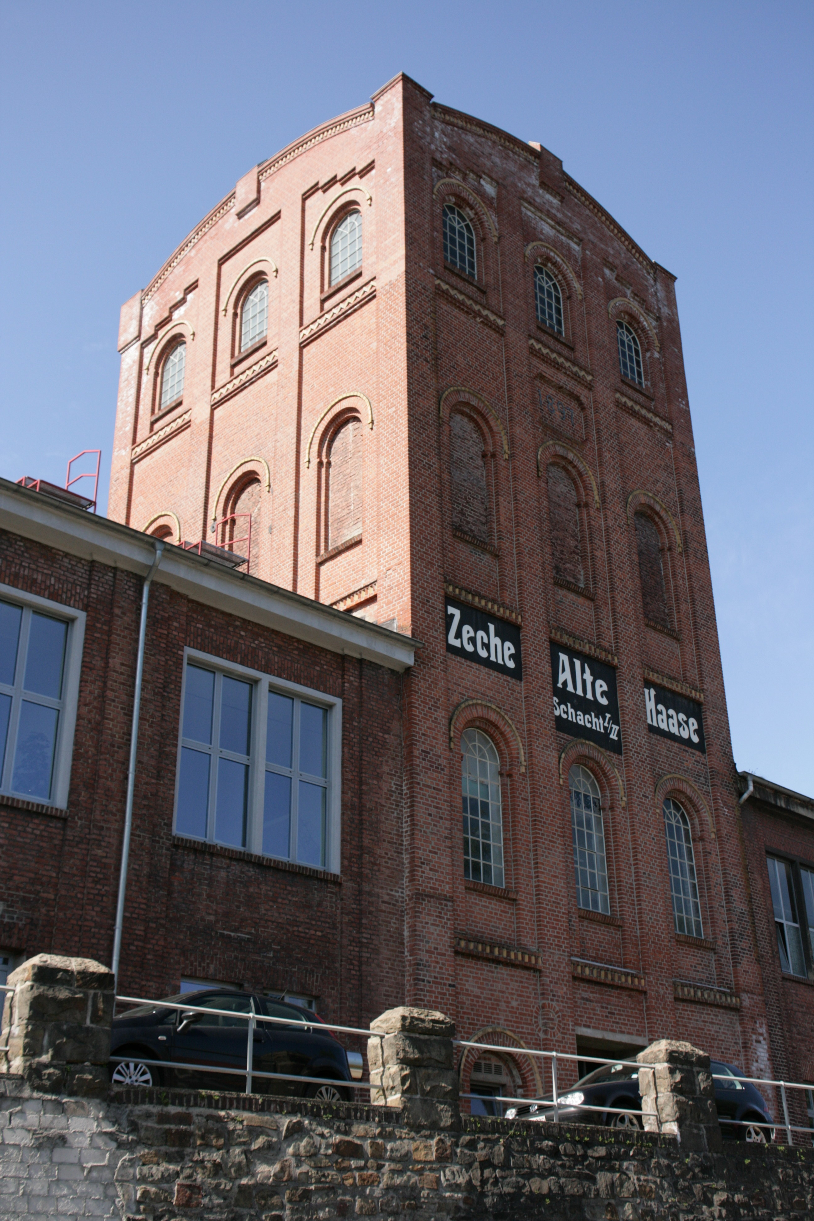 Malakow-Turm über Schacht I/II (Schacht Julie) der Zeche Alte Haase, Hattinger Straße in Sprockhövel